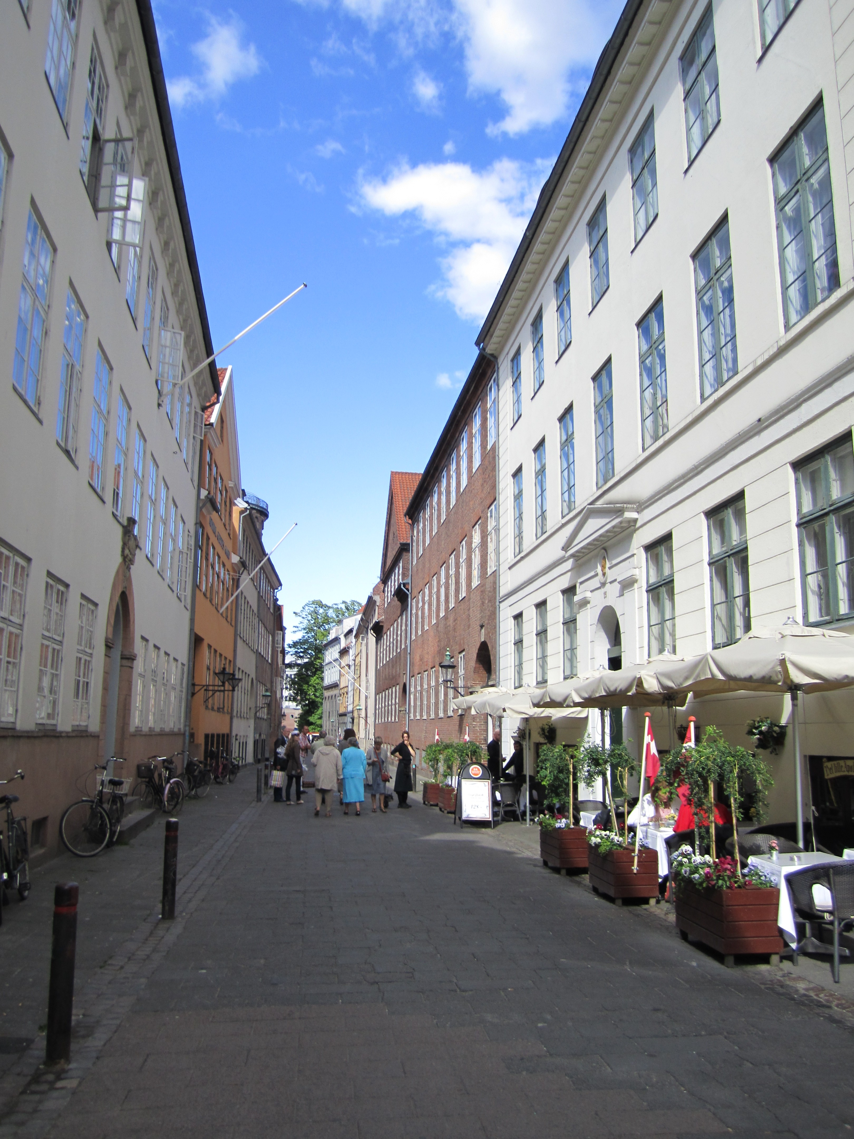 Store Kannikestræde in Copenhagen, Denmark